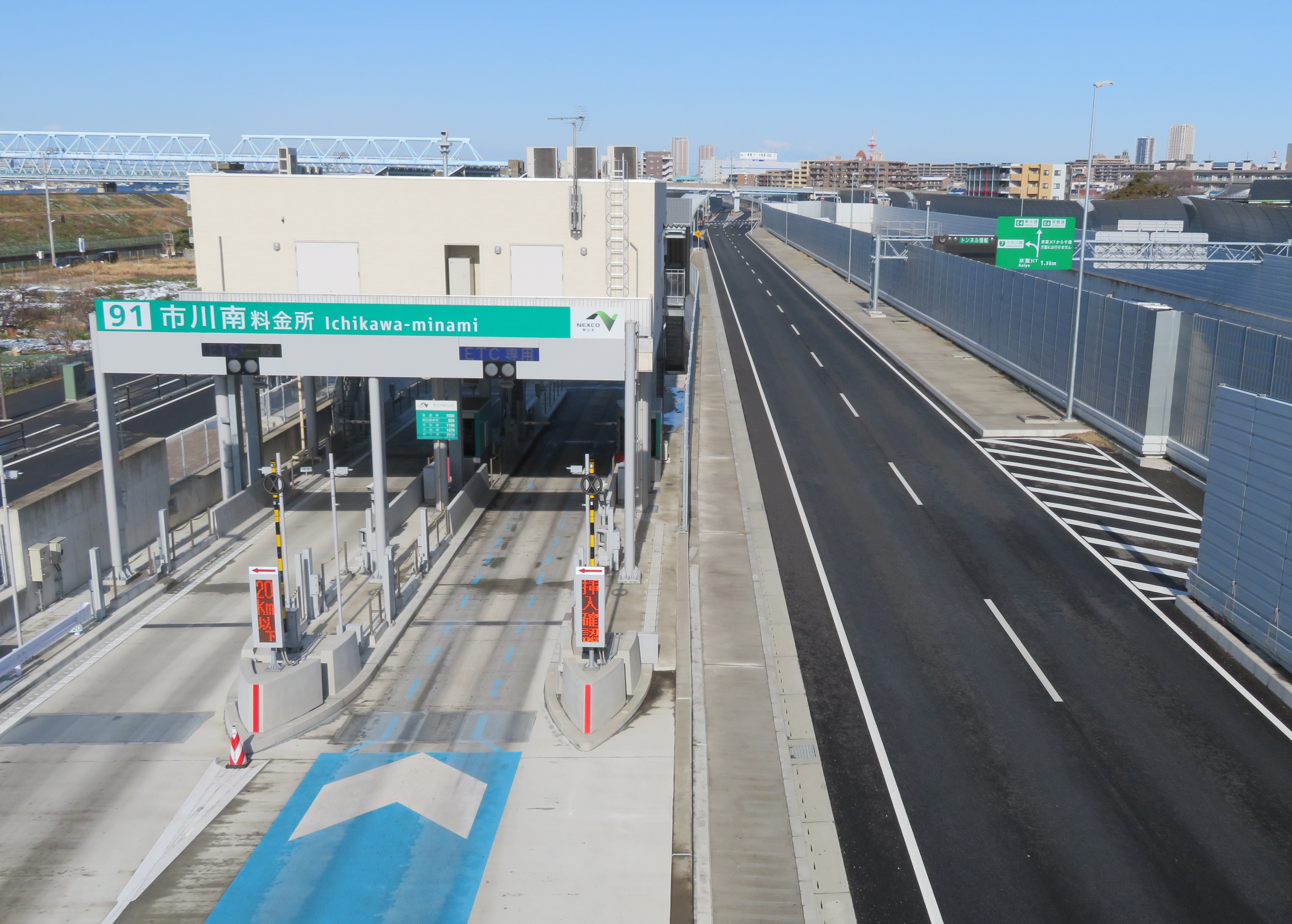 東京外環自動車道 市川南インターチェンジ 入口料金所付近 Canon PowerShot SX720 HS